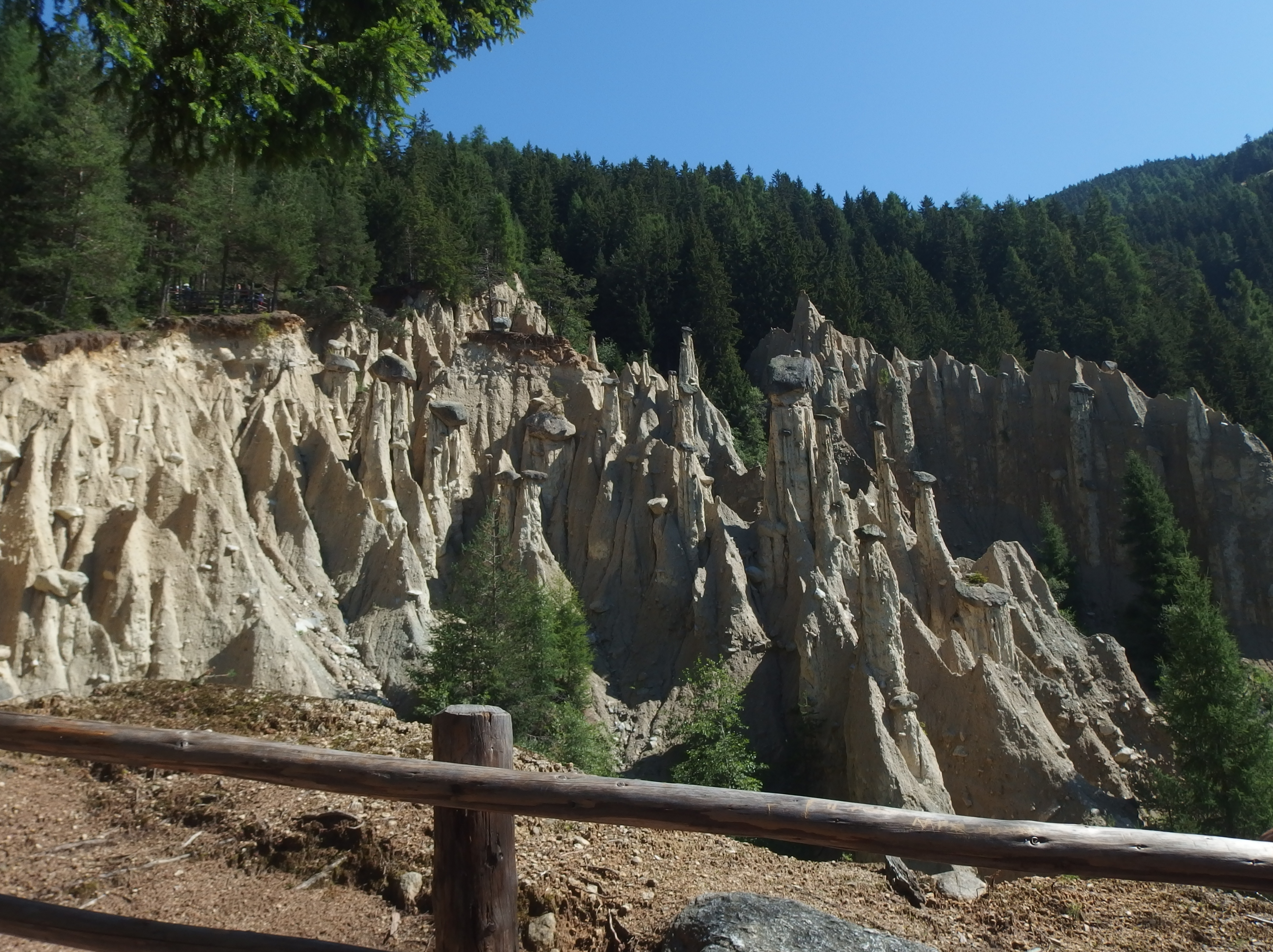 Die Erdpyramiden bei Oberwielenbach, einem Ortsteil von Percha (Südtirol), auch Erdpyramiden von Platten genannt.